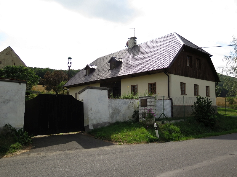 Venkovská usedlost, Balkovy 6, Balkovy.